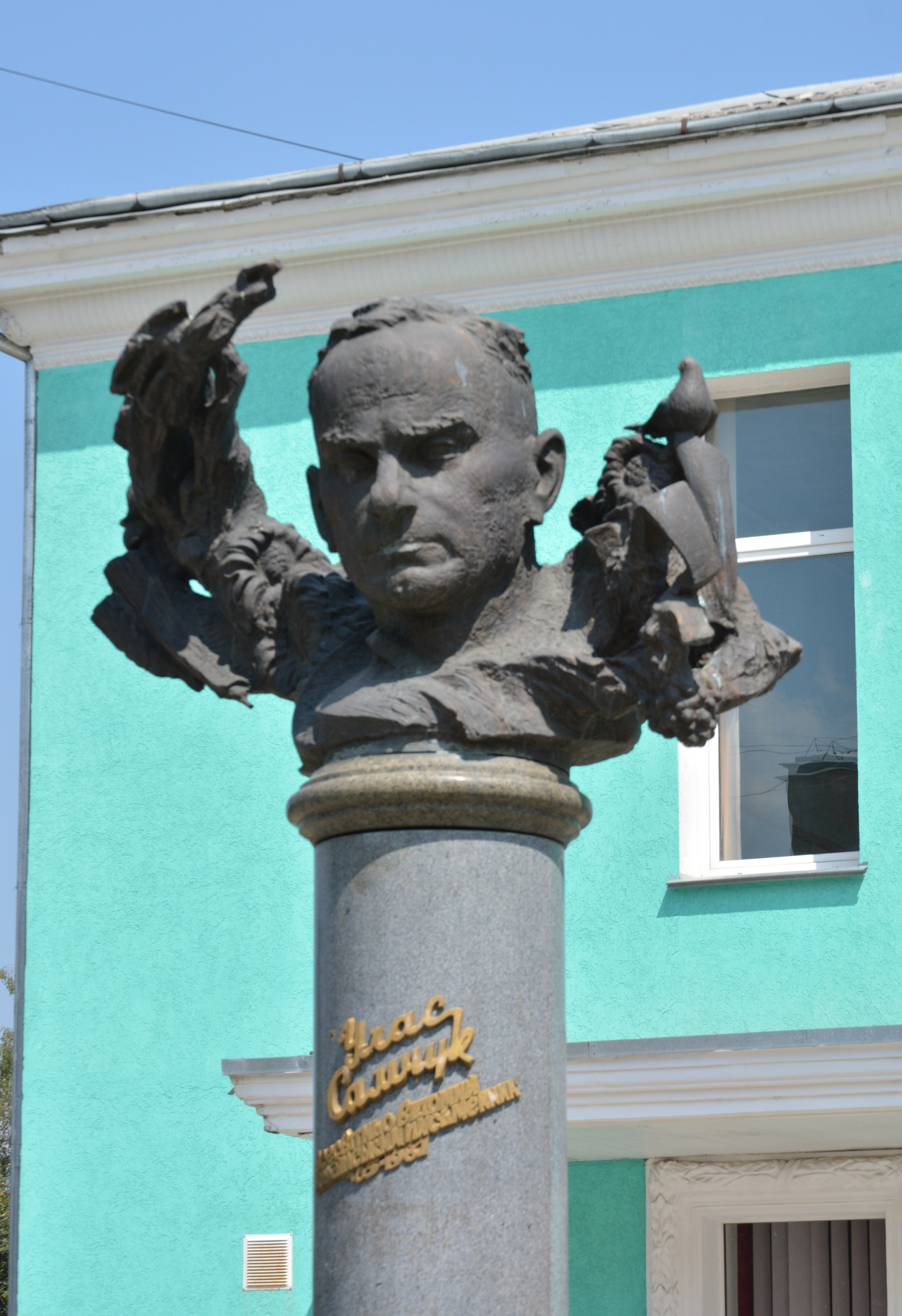 Пам'ятник Уласу Самчуку, Здолбунів